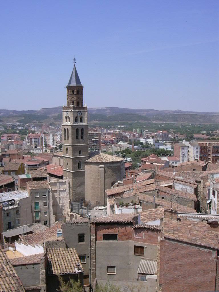 Vista general de Fraga con iglesia de san Pedro en el centro. Al fondo, Fraga la nova.